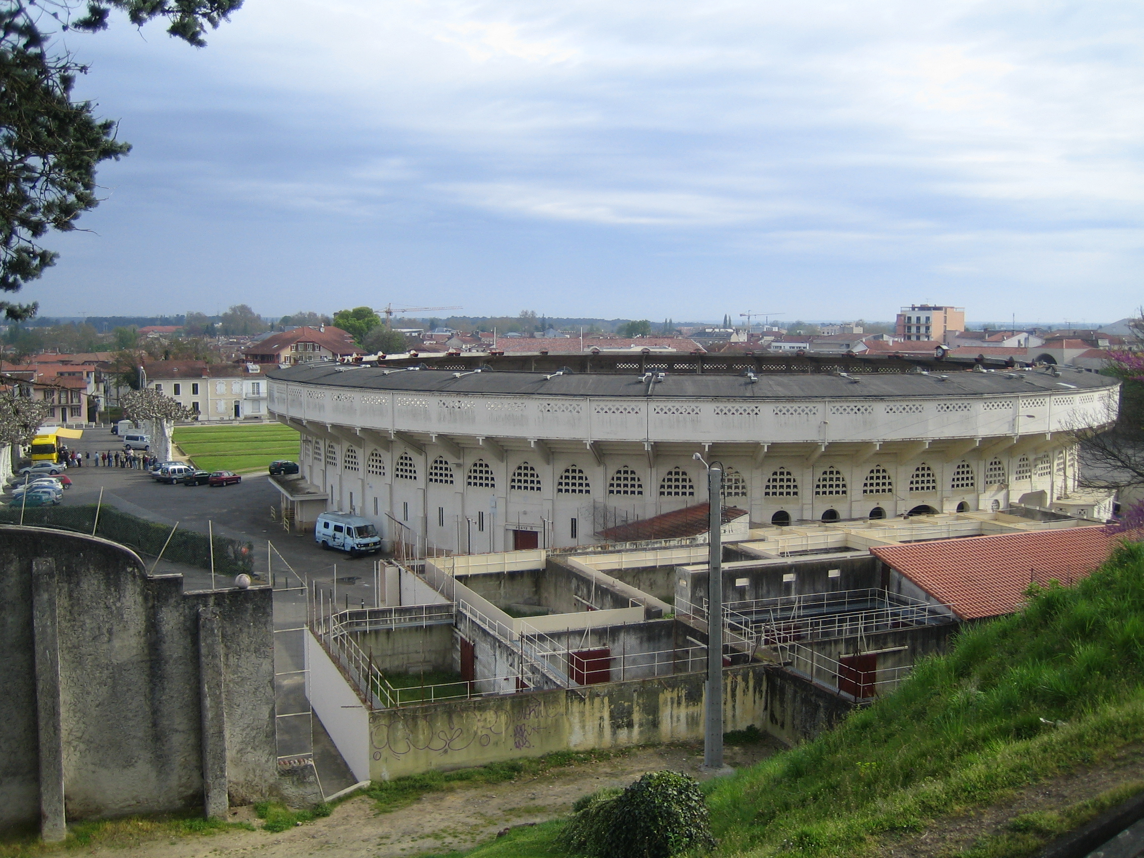 Mont-de-Marsan (France, Landes) : les arènes.